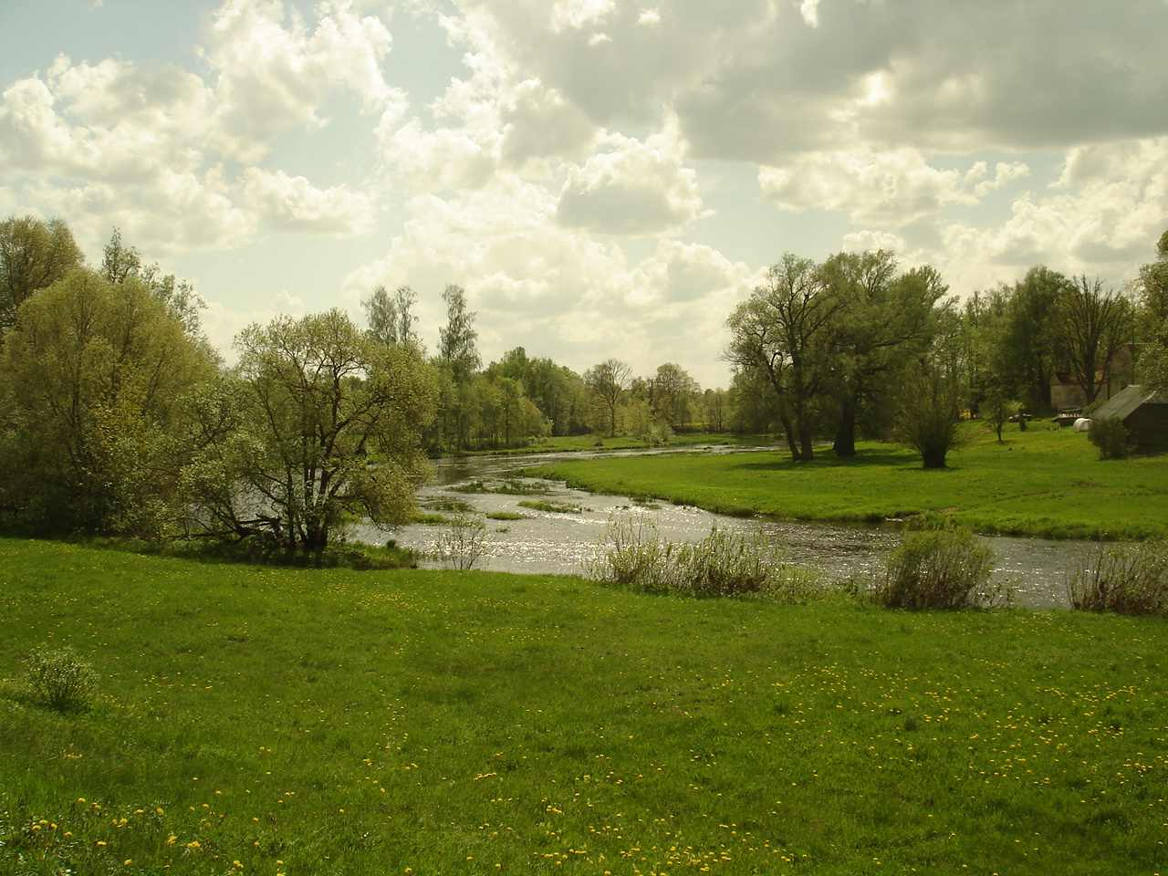 ДиенвидсусеяLatviešu: Dienvidsusēja pie Ērberģes